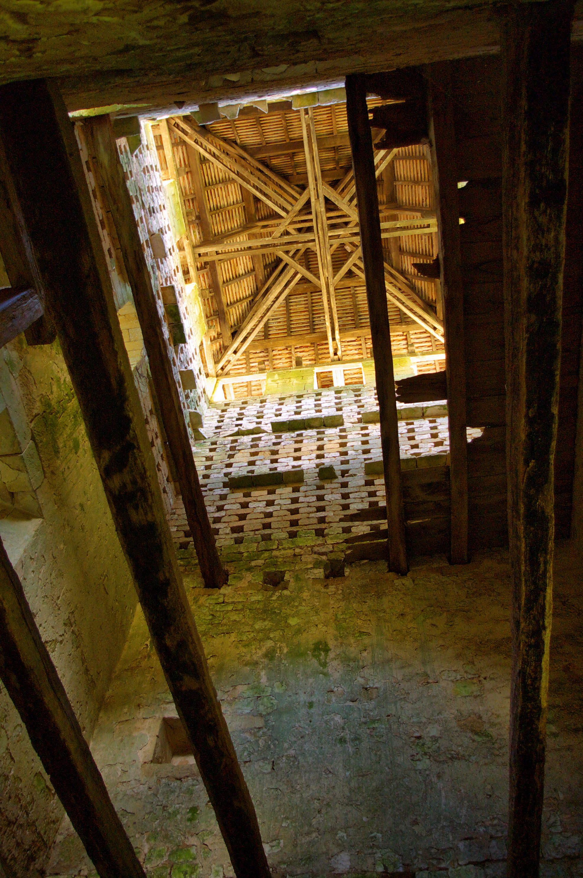 Tour-pigeonnier de Labio